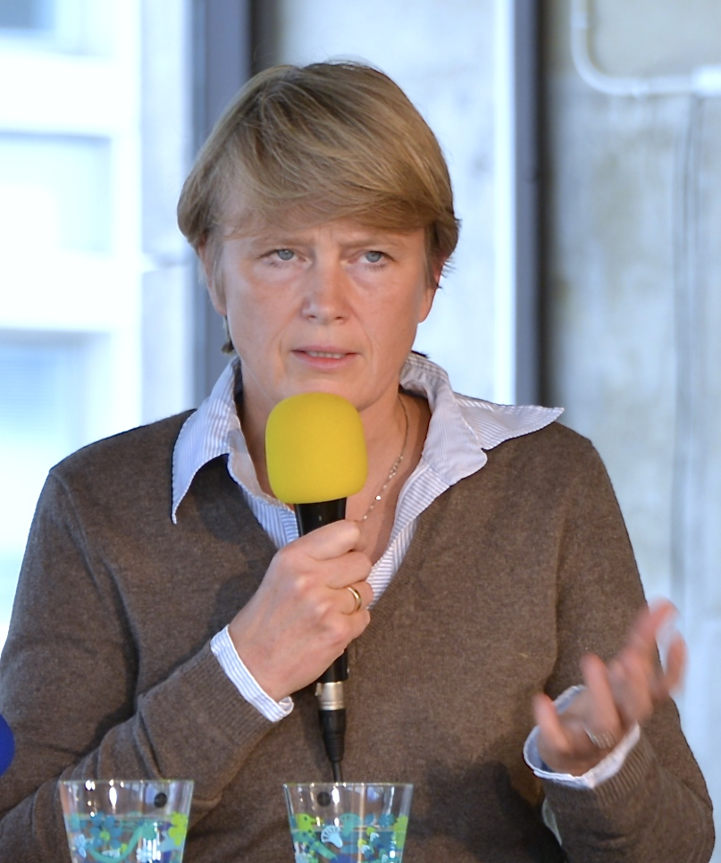 Irene Wennemo, ledarskribent Dagens Arena, i Ekots lördagsintervju inför valet i september. 30 augusti 2014 på Kulturhuset i Stockholm.